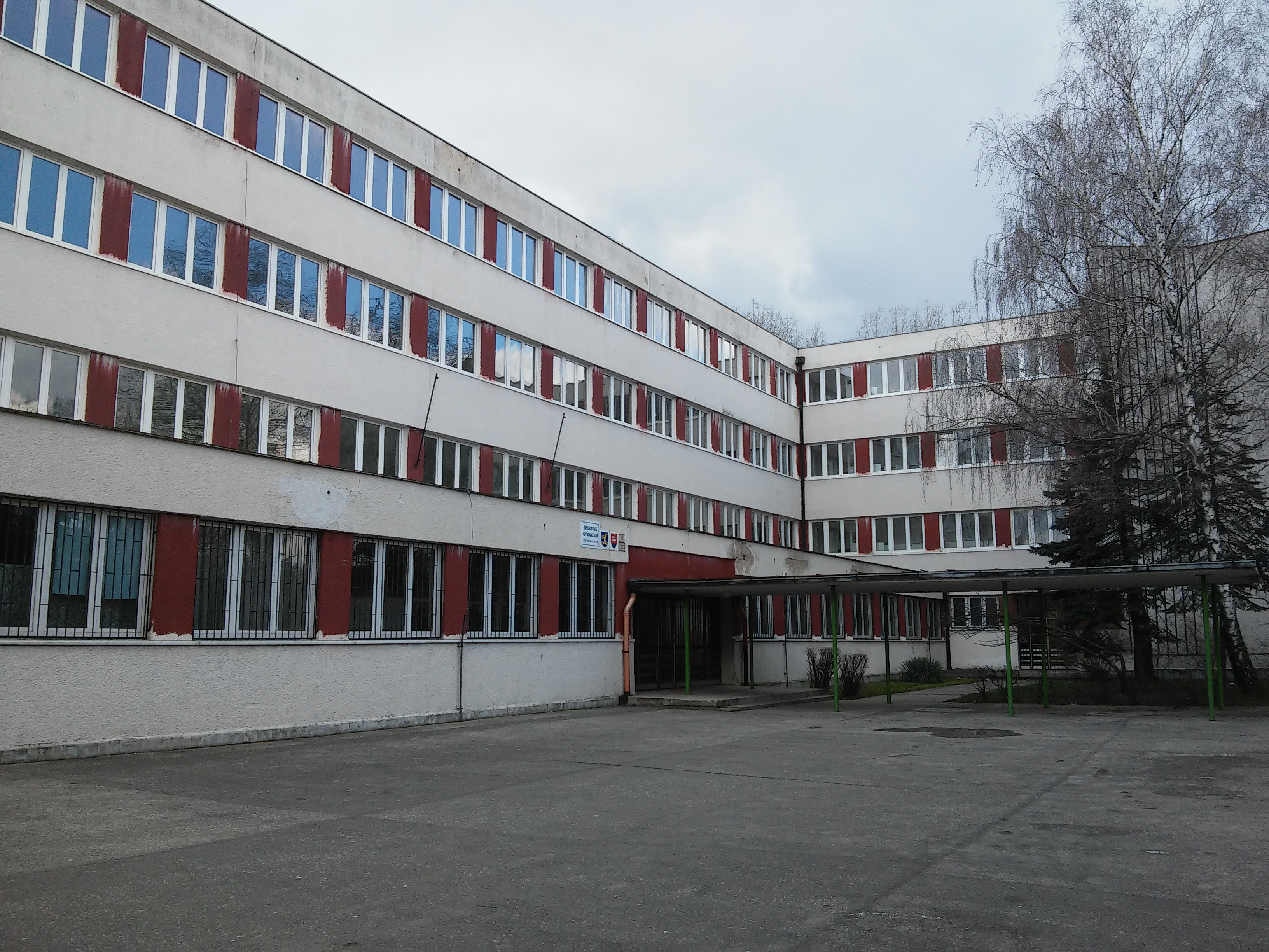 Športové gymnázium Ostredková 10, Bratislava